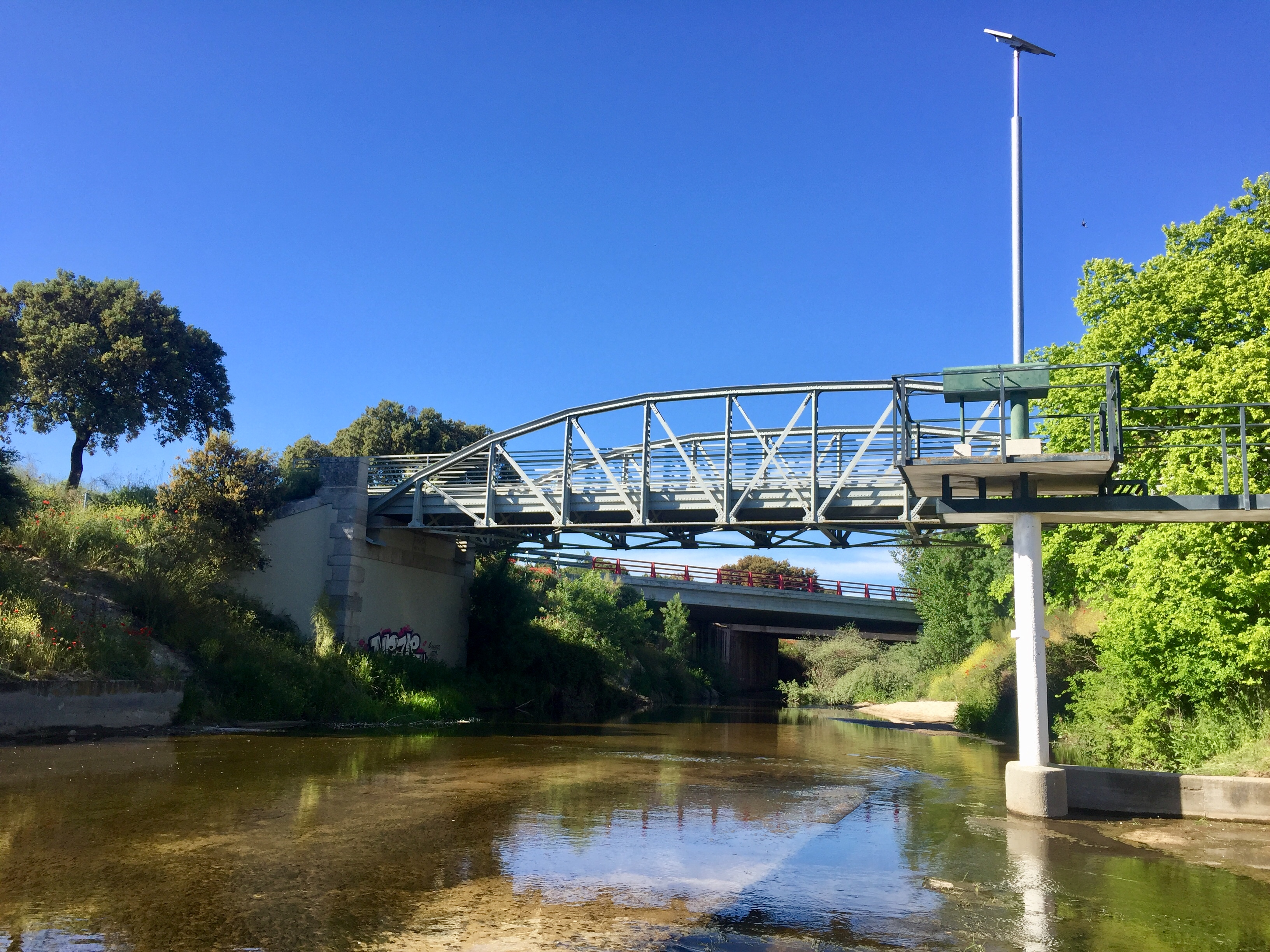 Río Perales a su paso por el término municipal de Navalagamella (Madrid, España).